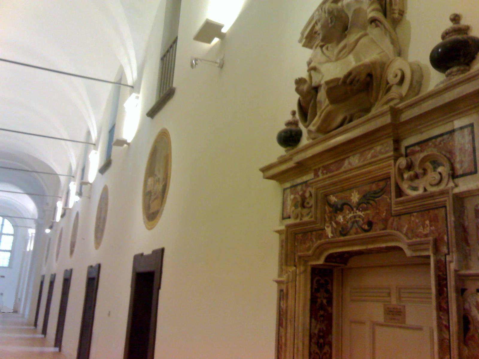 Convento di san Domenico Maggiore di Napoli - le sale dei domenicani (in primo piano al sala di san Tommaso d'Aquino)